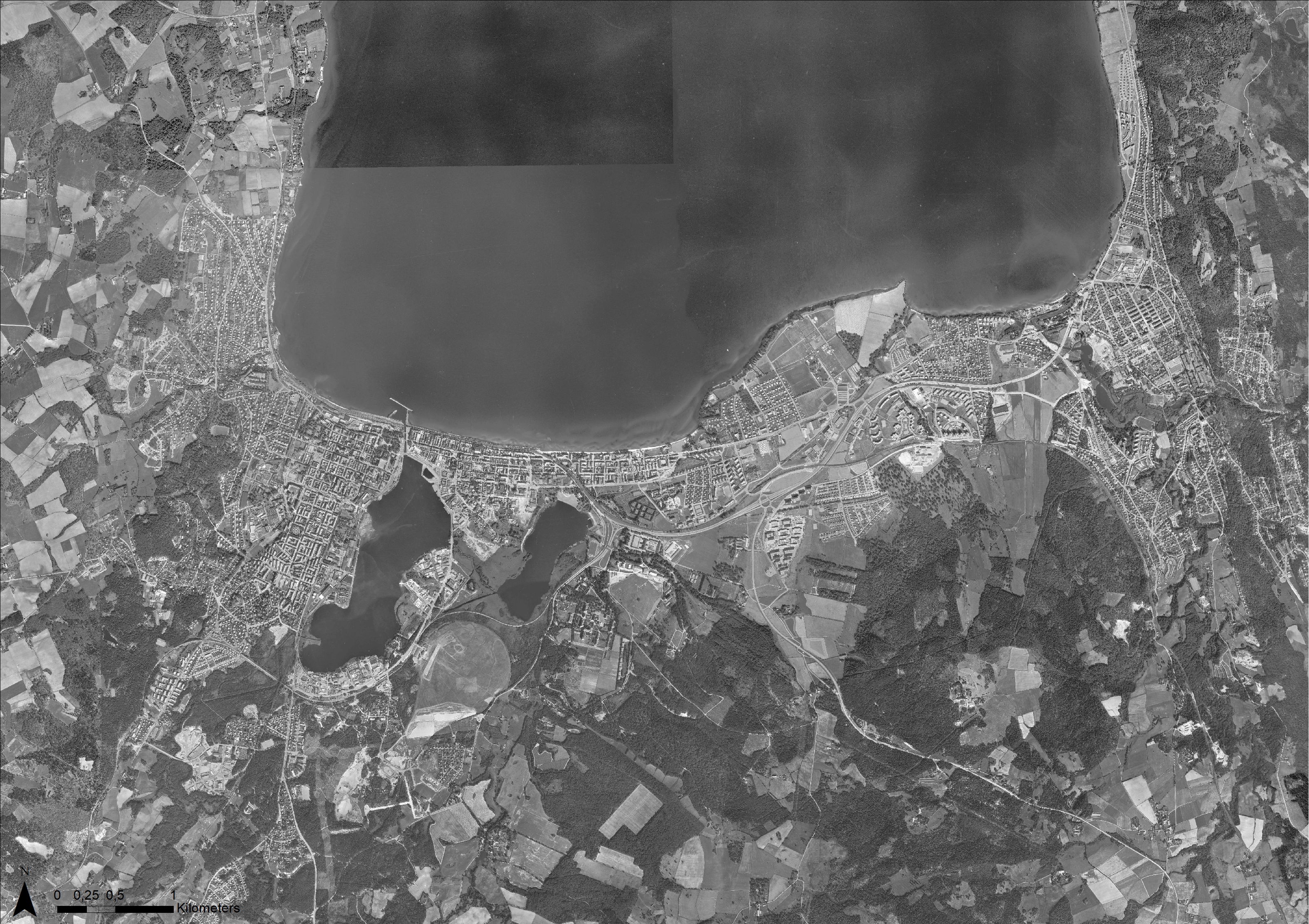 Flygfoto över Jönköping, bilden är tagen någon gång mellan 1955-1965.